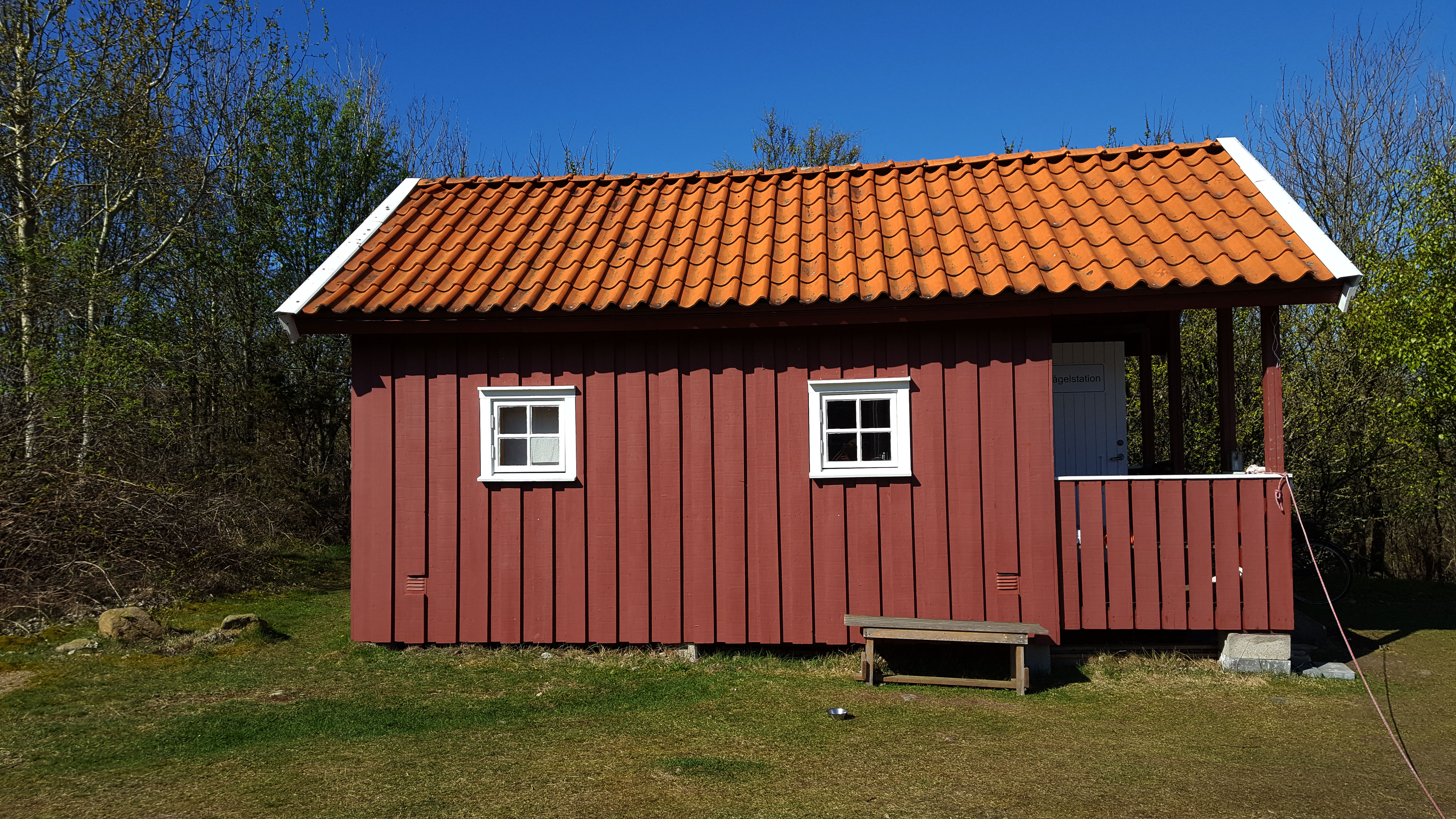 Här är vårt labb på Grosshamn